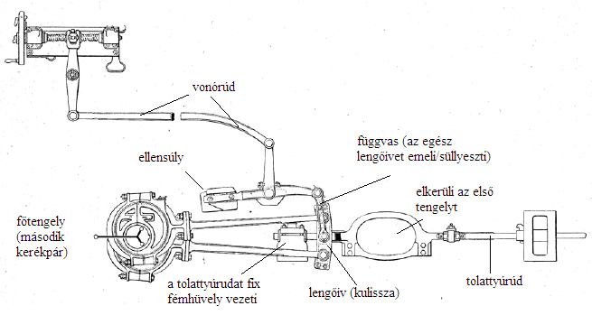 Főkereten belül elhelyezett Stephenson-vezérmű egy 1867-ben épített francia vegyesvonati mozdonyban (Midi801); szerkezeti elemek megnevezése a Vasúti lexikon alapján